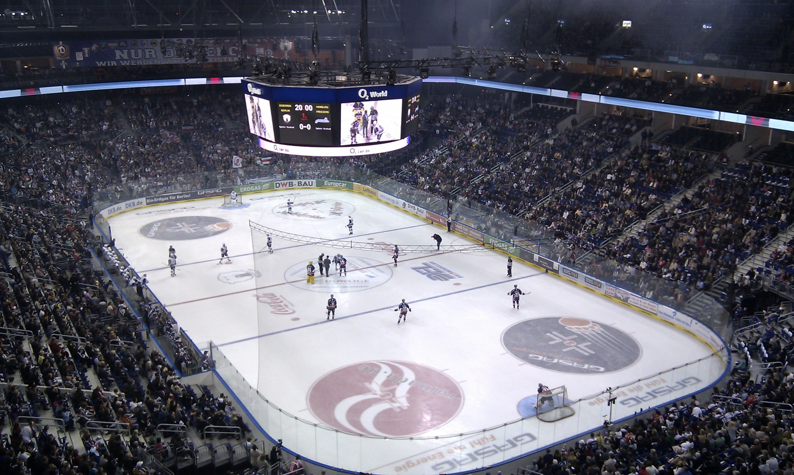 Berliner Eisbären gegen Hamburg Breezers in der o2 World.